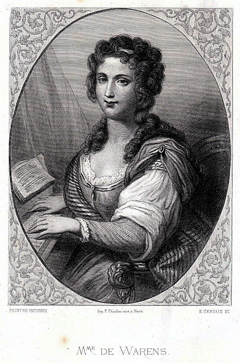 dimension toute la planche: 27x17 cm Françoise-Louise de Warens, également connue sous les noms de Madame de Warens ou Louise Éléonore de la Tour du Pil (née le 31 mars 1699 à Vevey et décédée le 29 juillet 1762 à Chambéry), est la tutrice et maîtresse de Jean-Jacques Rousseau (qui l'appelait Maman). En 1713, elle épouse M. de Loys et devient baronne de Warens (ou orthographié Vuarrens), du nom d'une propriété de son mari près de Vevey. Elle fait annuler son mariage la même année. Protestante émigrée de Suisse installée à Annecy puis aux Charmettes sur les hauteurs de Chambéry, Madame de Warens reste une personne très controversée : en 1726, elle renie sa religion, s'enfuit avec la caisse d'une manufacture de bas de soie et de laine qu'elle a fondée et qui périclite, devient catholique, abjure entre les mains de l'évêque d'Annecy, perçoit dès lors une pension de l'Église pour diffuser la religion dans la région frontière de Genève (alors capitale du protestantisme) et se fait pensionner par le roi de Sardaigne Victor-Amédée II. Femme très libérale pour son époque, elle remplit alors probablement également un rôle politique d’agent de liaison avec le chef de la maison de Savoie.